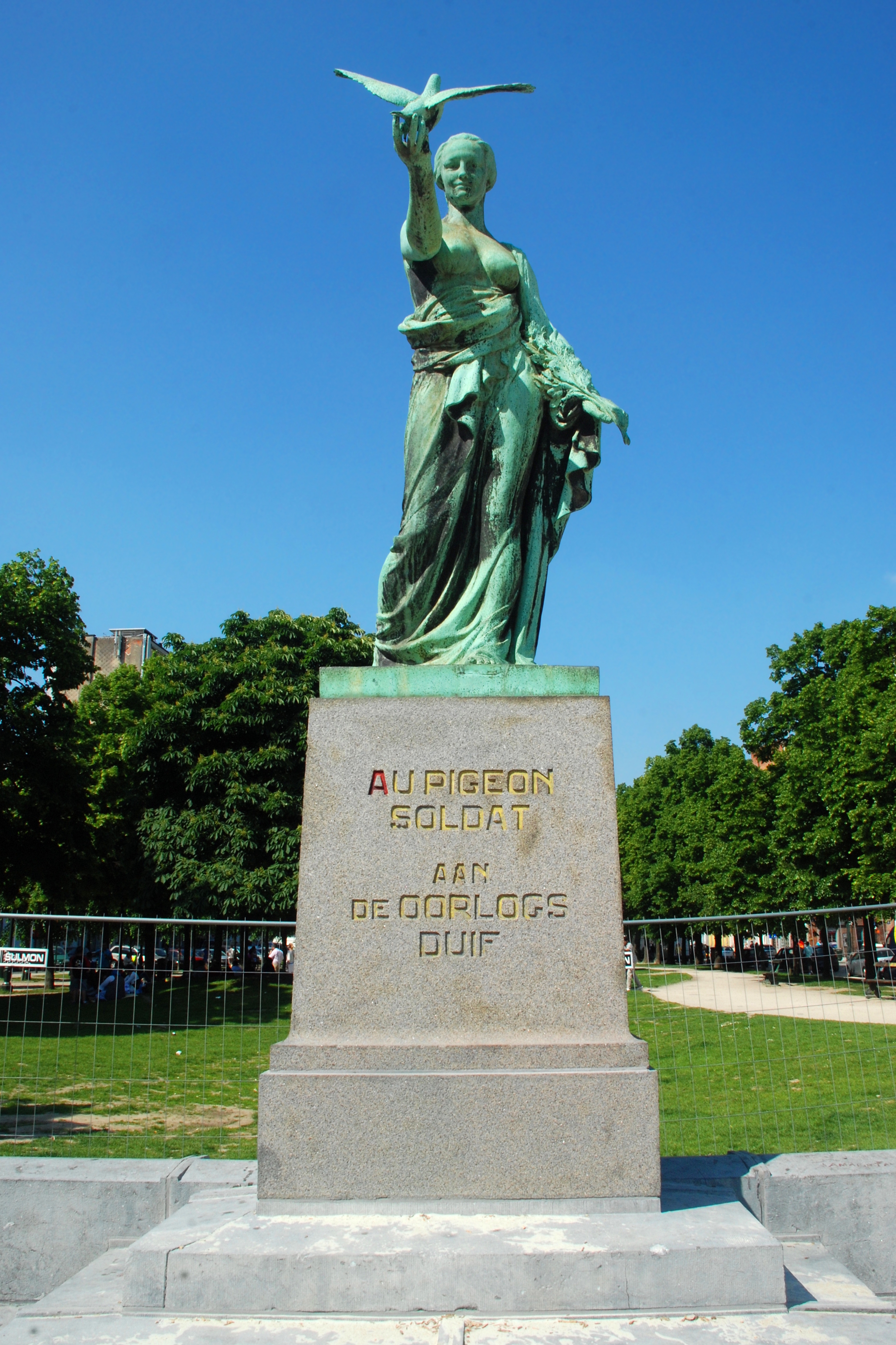 Belgique - Bruxelles - Monument au Pigeon-Soldat (architecte Georges Hano - sculpteur Victor Voets)